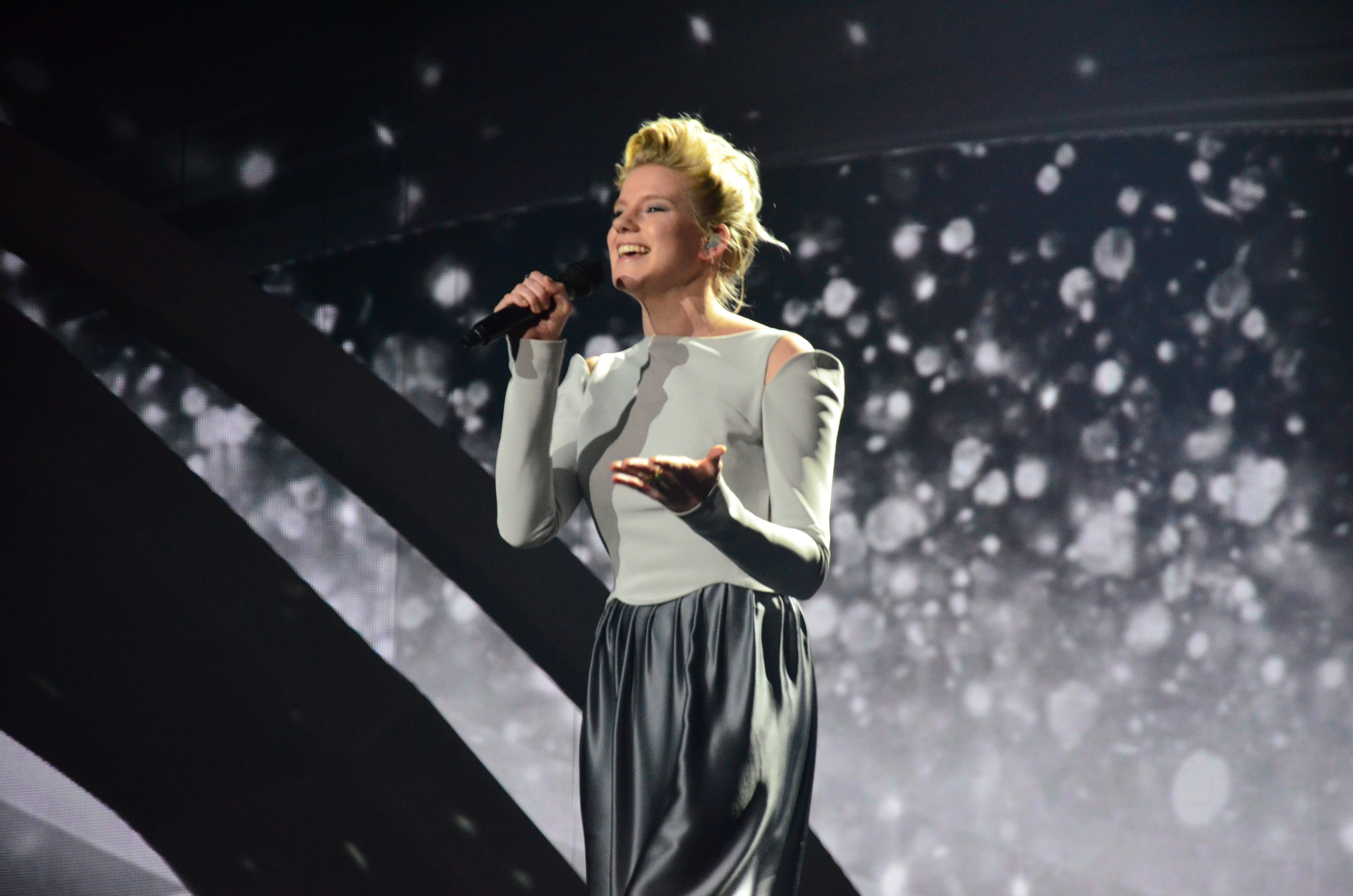 10 травня 2017 року у Києві відбулась генеральна репетиція 2 півфіналу "Євробачення".